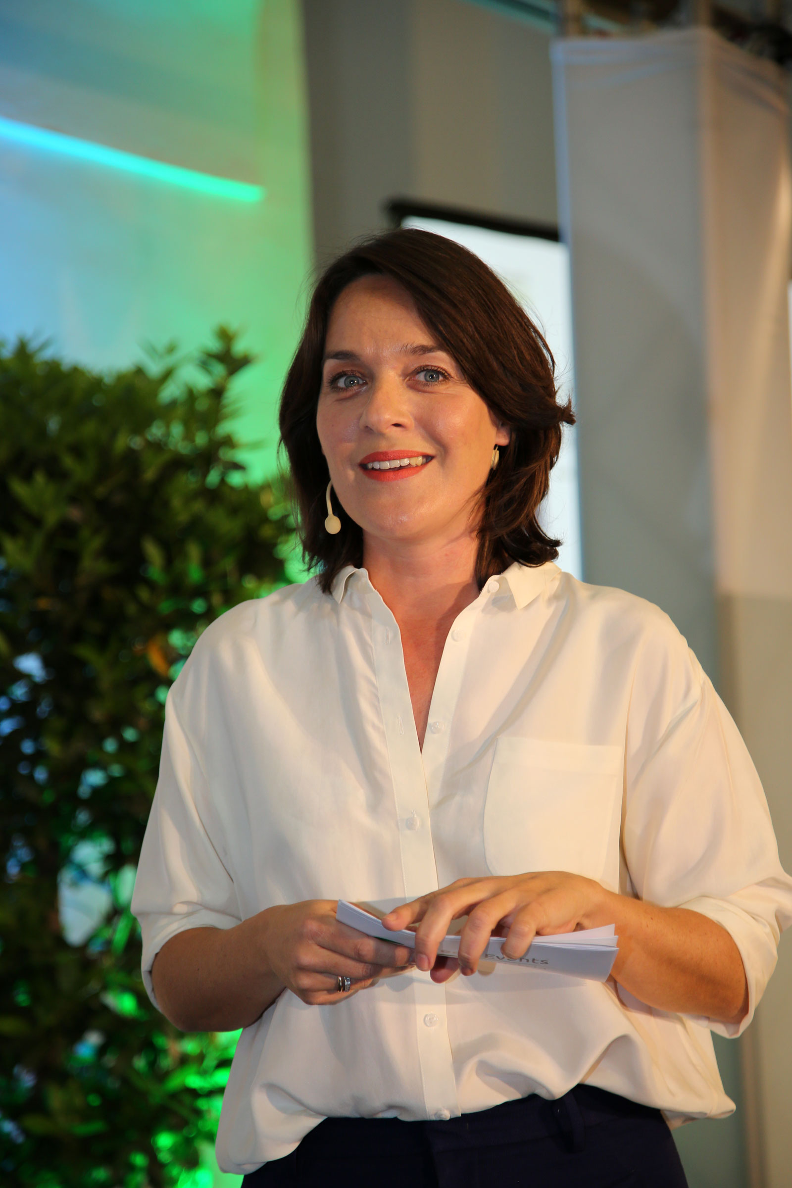 Pölzl_Eva-3715